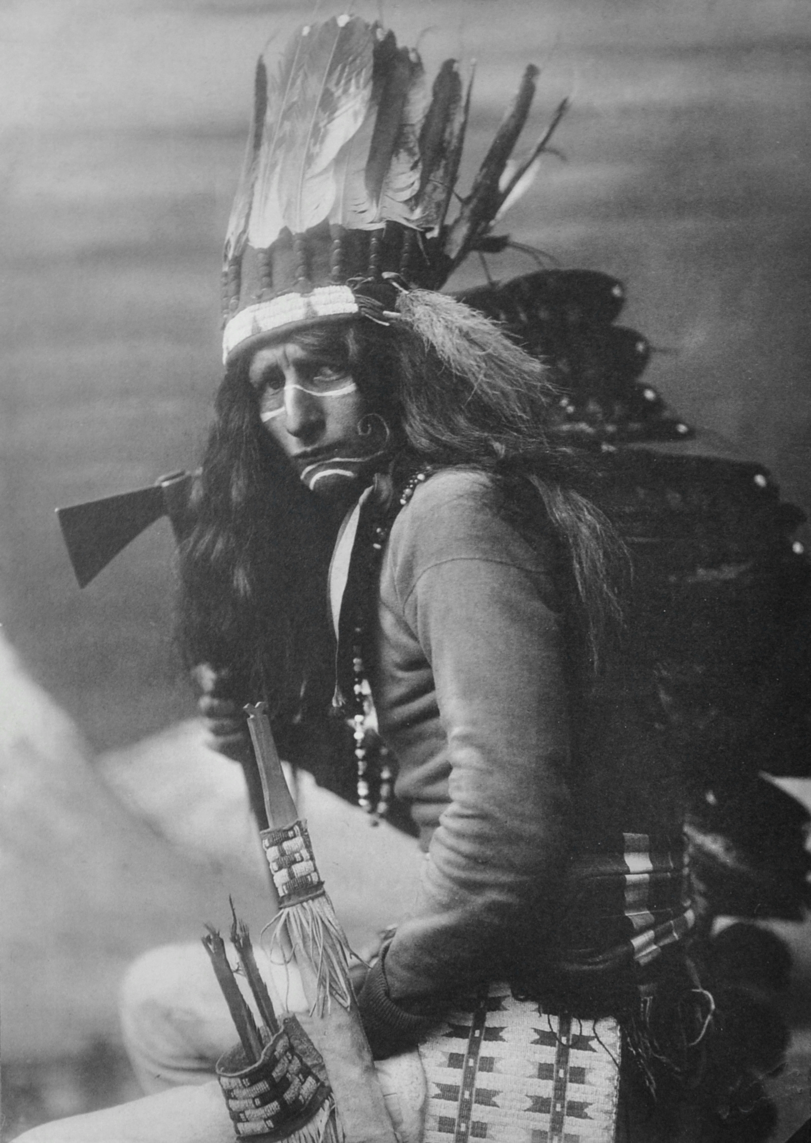 Porträt des Fabrikanten Guntram Hämmerle (1862–1923) in einem indianischen Kostüm, das er 1893 auf der Weltausstellung in Chicago vermutlich von dem berühmten Indianerscout Curly erworben hatte; Foto hergestellt in einem ungenannten Fotoatelier in Dornbirn, um 1894 vorarlberg museum Native namevorarlberg museumLocationBregenz, Vorarlberg, AustriaCoordinates47° 30′ 16″ N, 9° 44′ 48″ E Established1857WebsiteVorarlberg Museum website